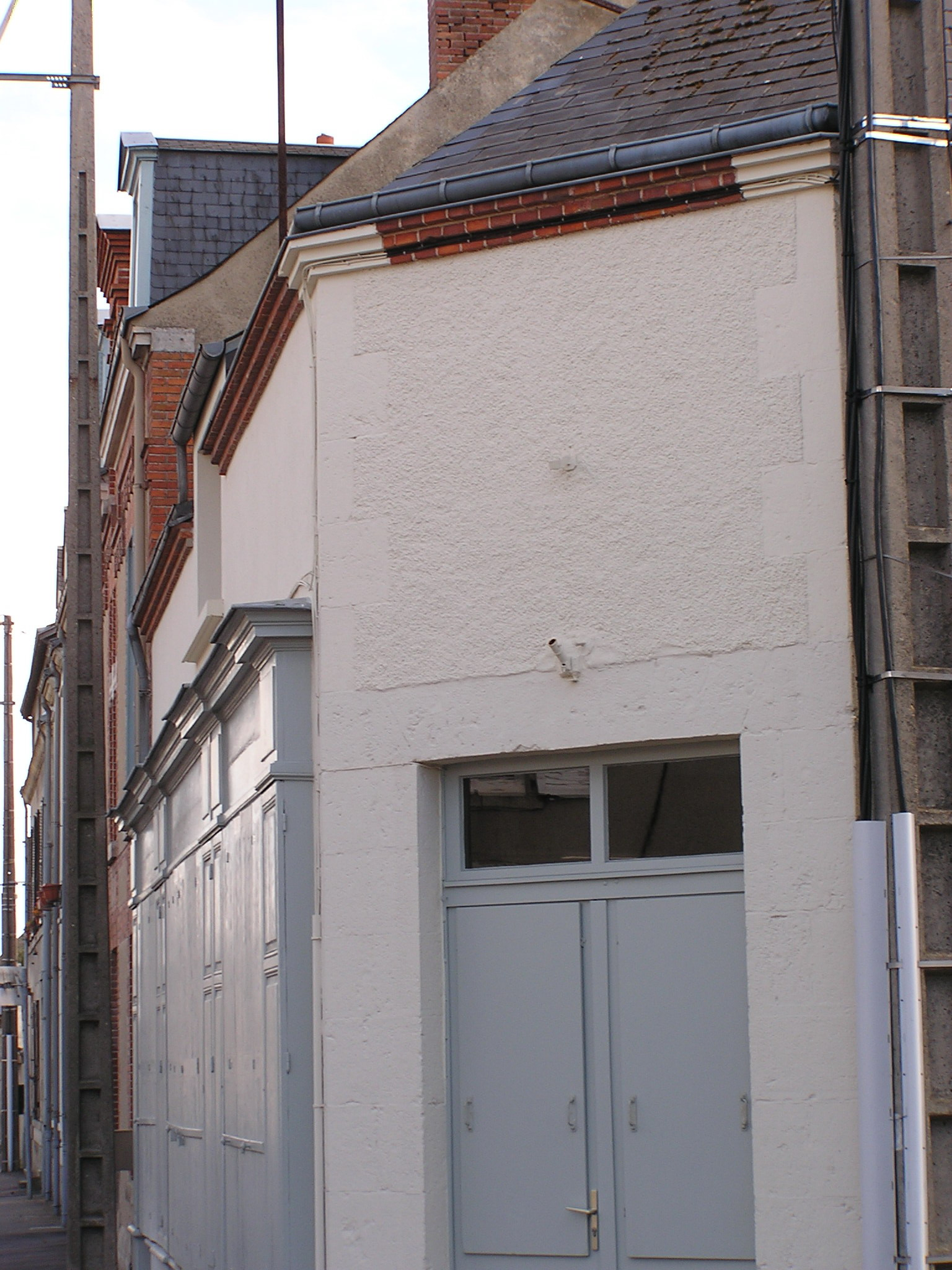 Le Magasin, à l'angle de la Grande Rue et de la rue Saint-Nicolas, lieu marquant de l'enfance de Maurice Genevoix